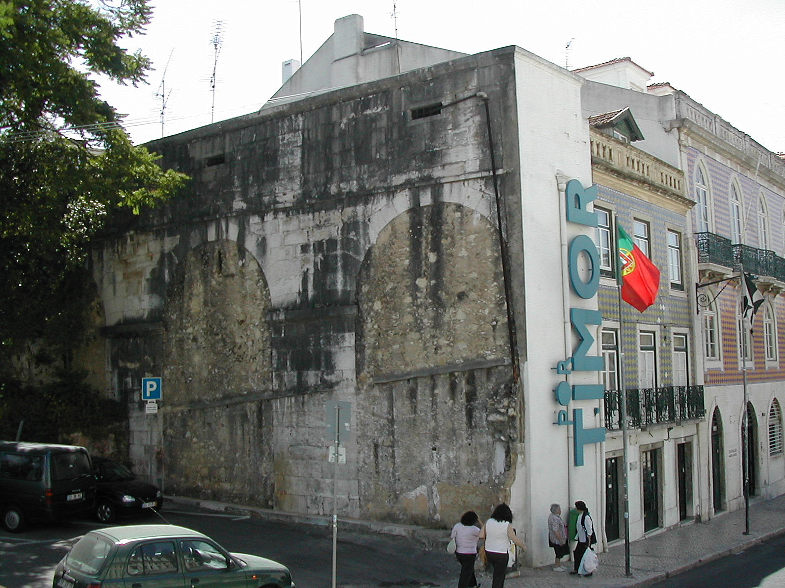 Galeria da Esperança, Aqueduto das Águas Livres, rua de São Bento, Lisboa, Portugal